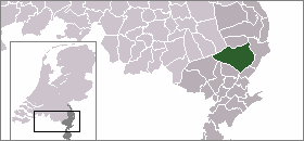 Locatie Peel en Maas